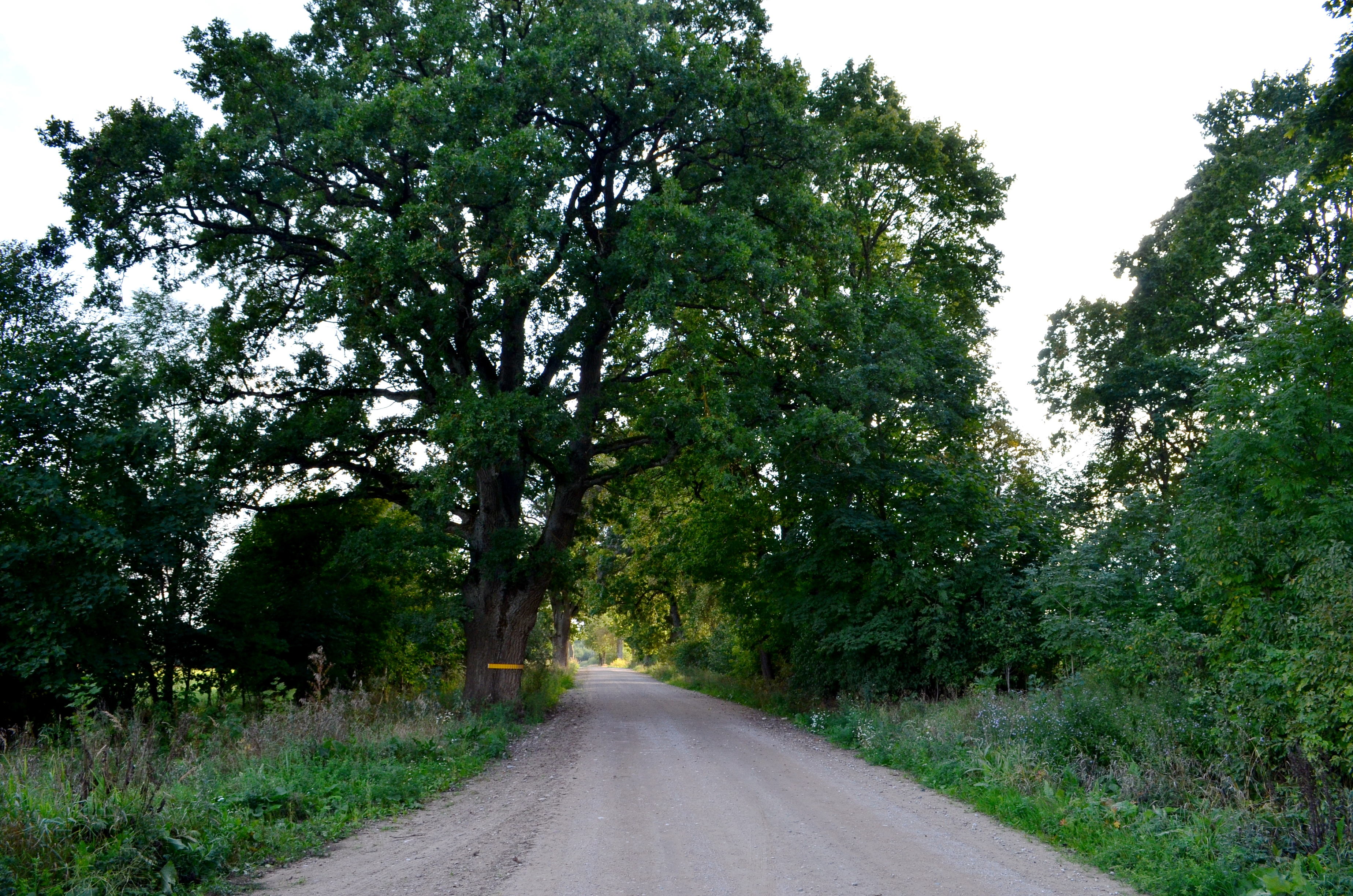 Medžių alėja, Mažuoliai, Radviliškio raj.